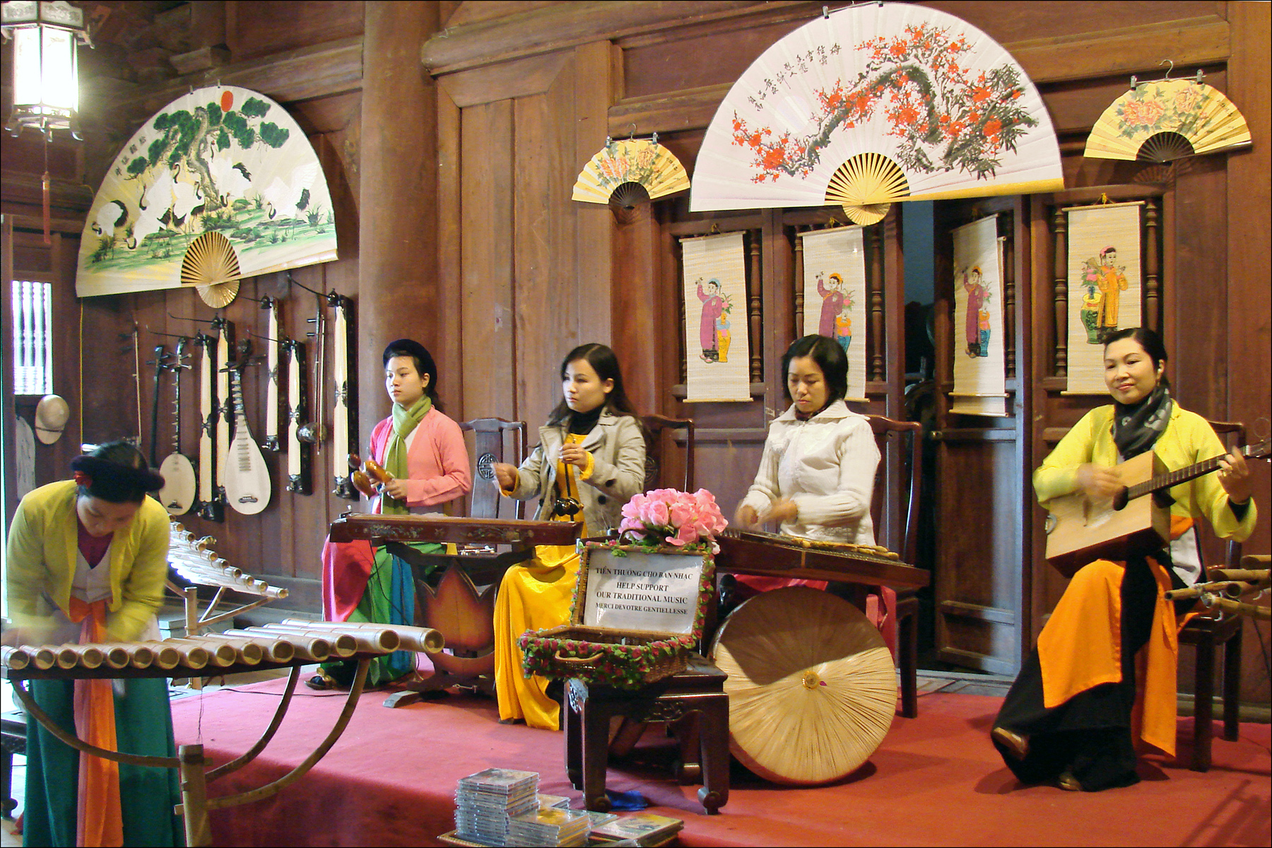 Orchestre traditionnel vietnamien dans le Temple de la Littérature.